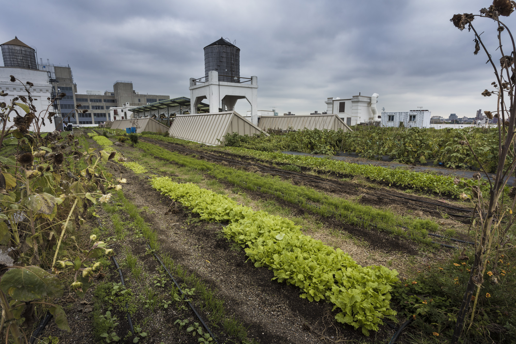 Site: Brooklyn Navy Yard